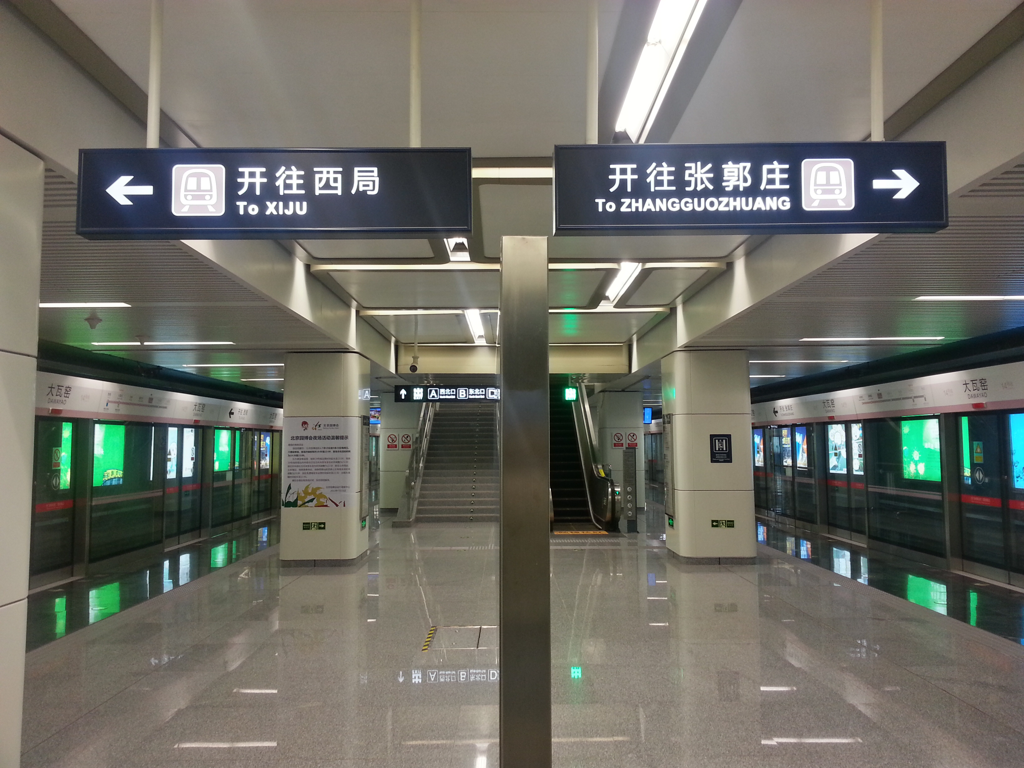 大瓦窑站站台